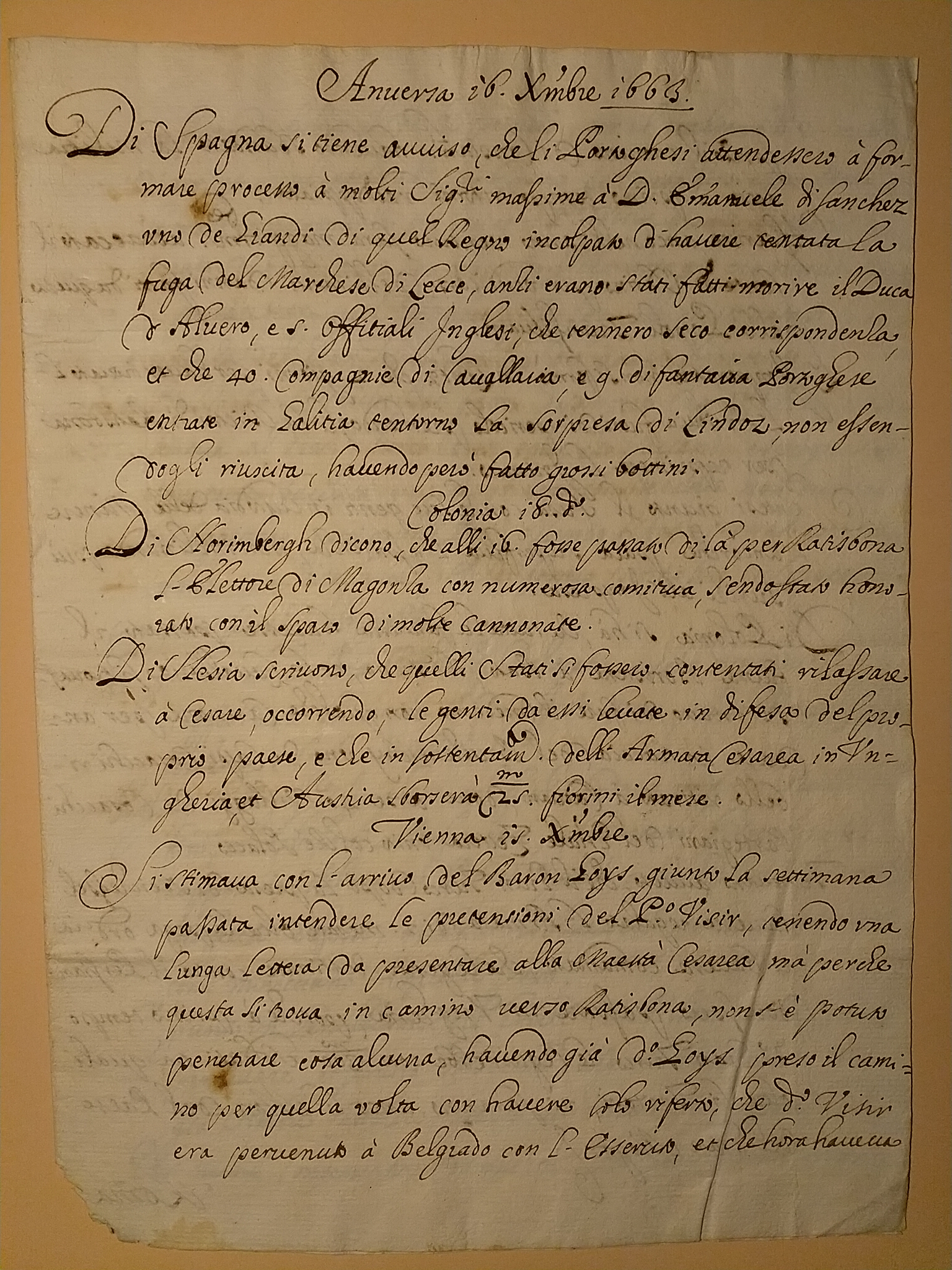 Periodical hand-writing newssheet with news from Anntwerp of 23 Dec 1663, Cologna, Vienna, Roma, Venezia